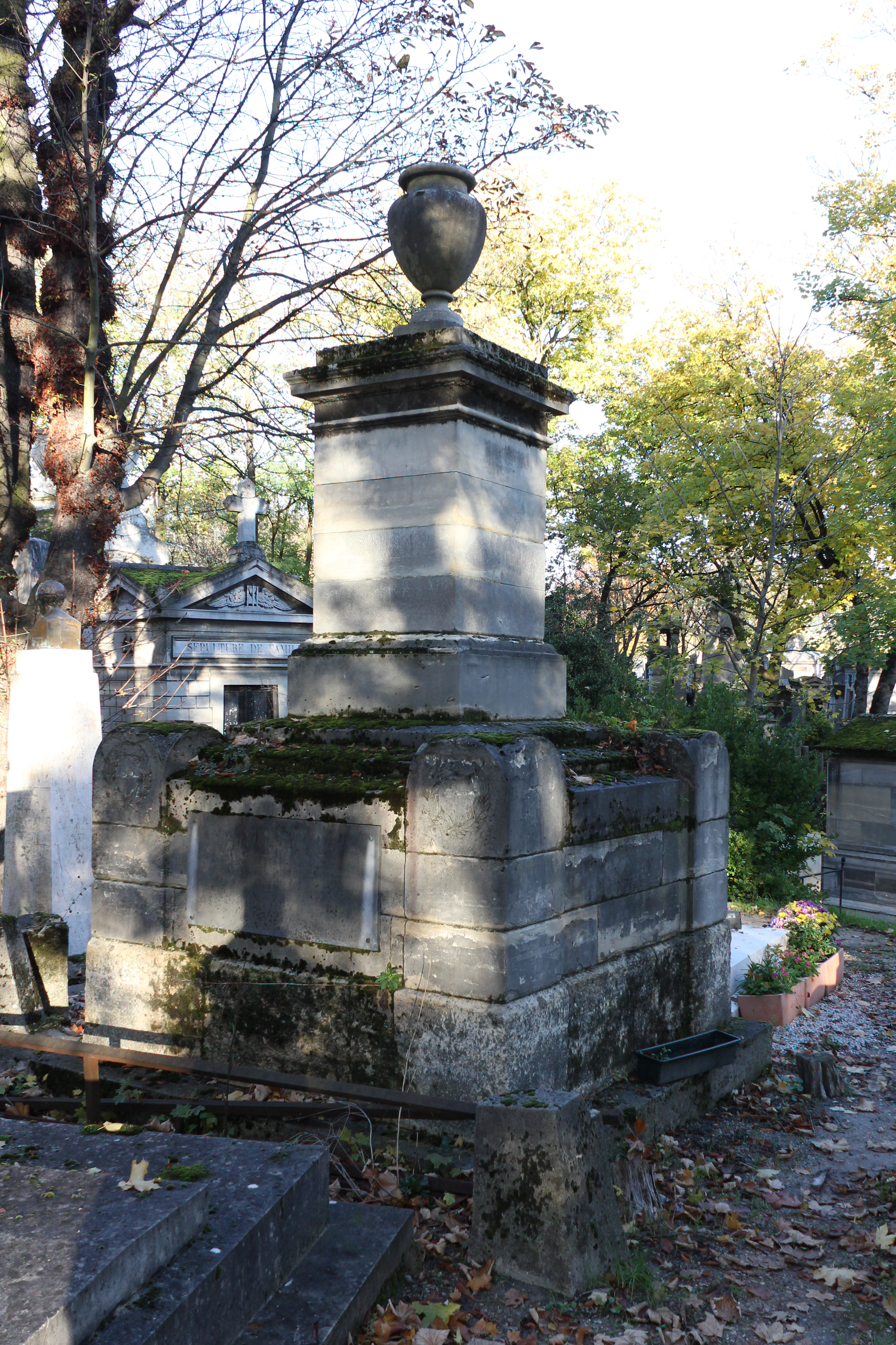 Sépulture de Ernst Frederik von Walterstorff (1755-1820), lieutenant général des armées du roi du Danemark, envoyé extraordinaire et ministre plénipotentiaire. Monument orné du buste de Walterstorff et d'un bas-relief représentant l’Histoire.